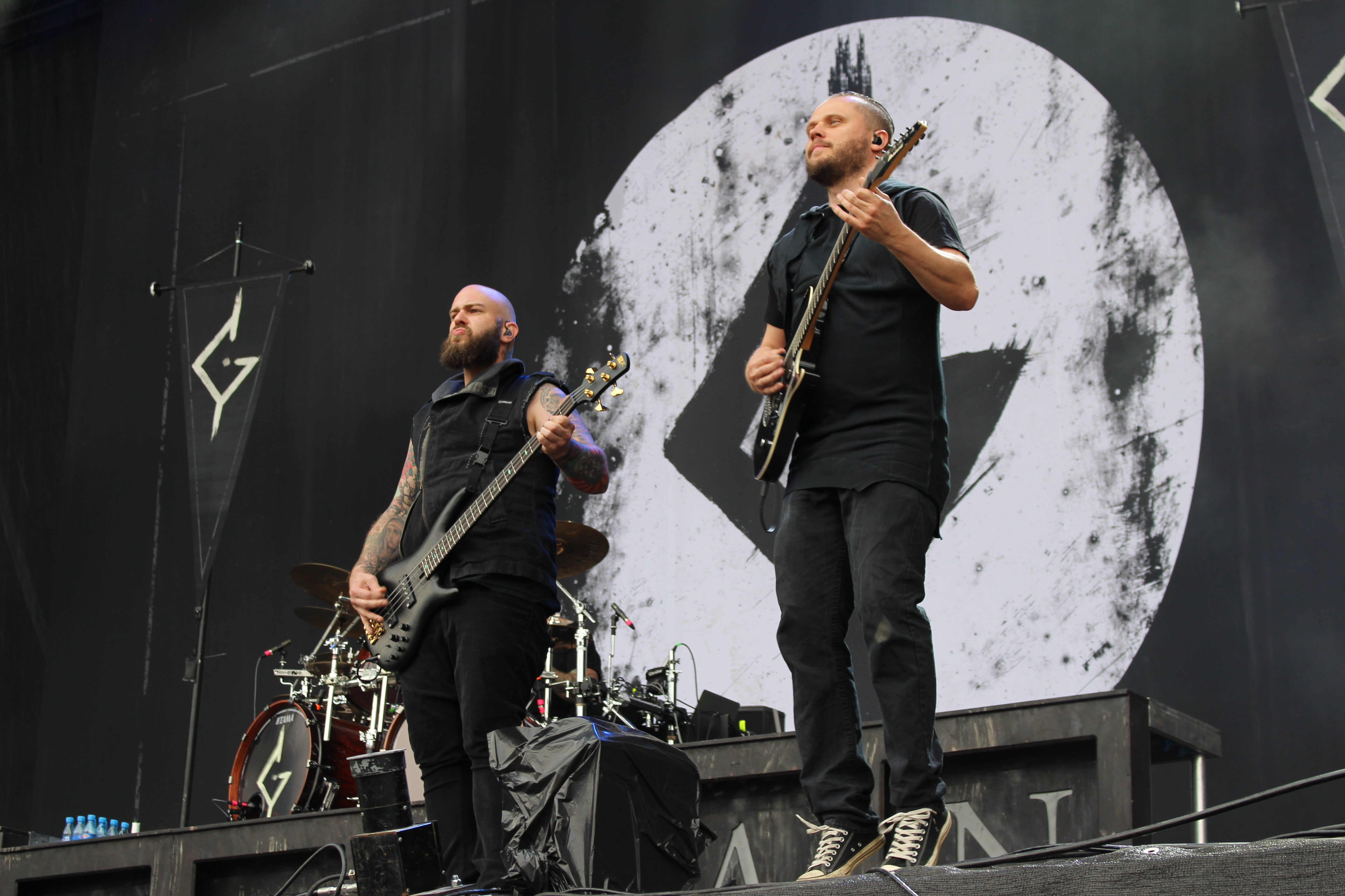 Festivalsommer This photo was created with the support of donations to Wikimedia Deutschland in the context of the CPB project "Festival Summer".